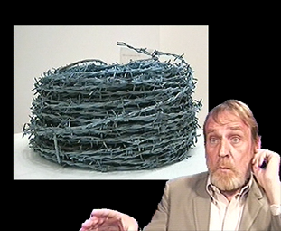 Portrait de Daniel Pommereulle